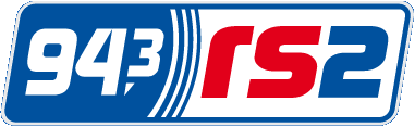 Logo des Radiosenders 94,3 rs2